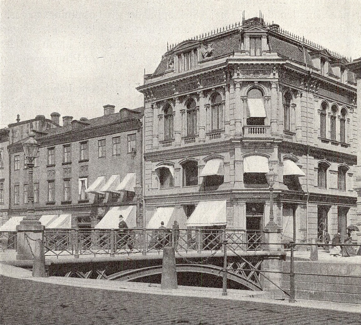 Denninghoffska huset vid Östra Hamngatan med Östra Drottninggatubron i förgrunden.